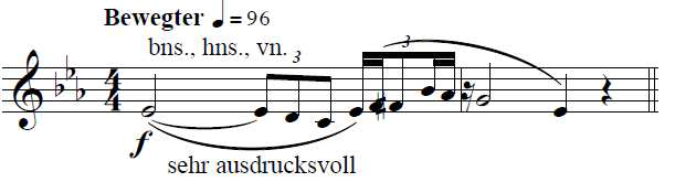 Leitmotive passió